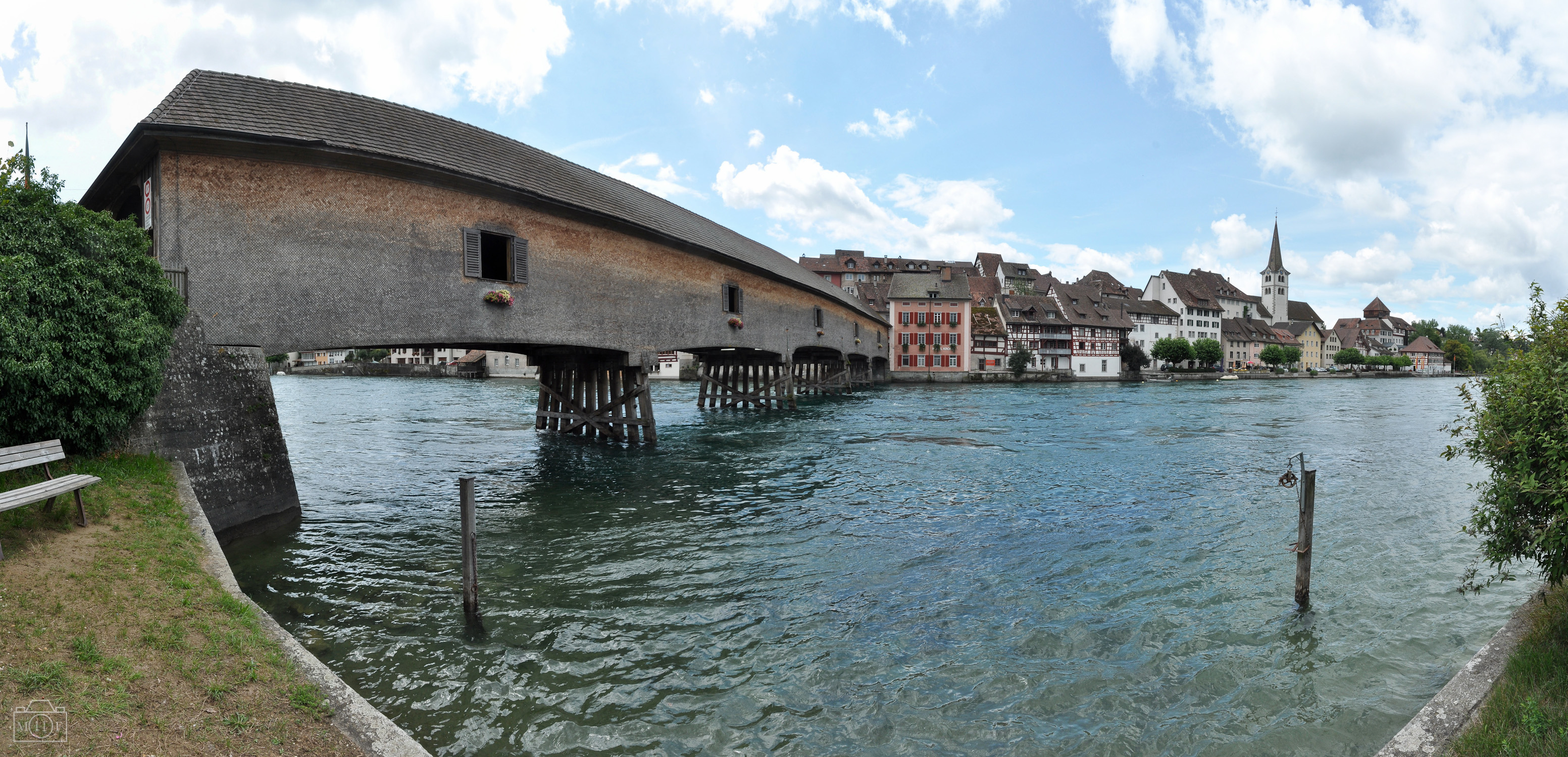 Rheinbrücke Diessenhofen–Gailingen mit Blick auf das Städtchen Diessenhofen